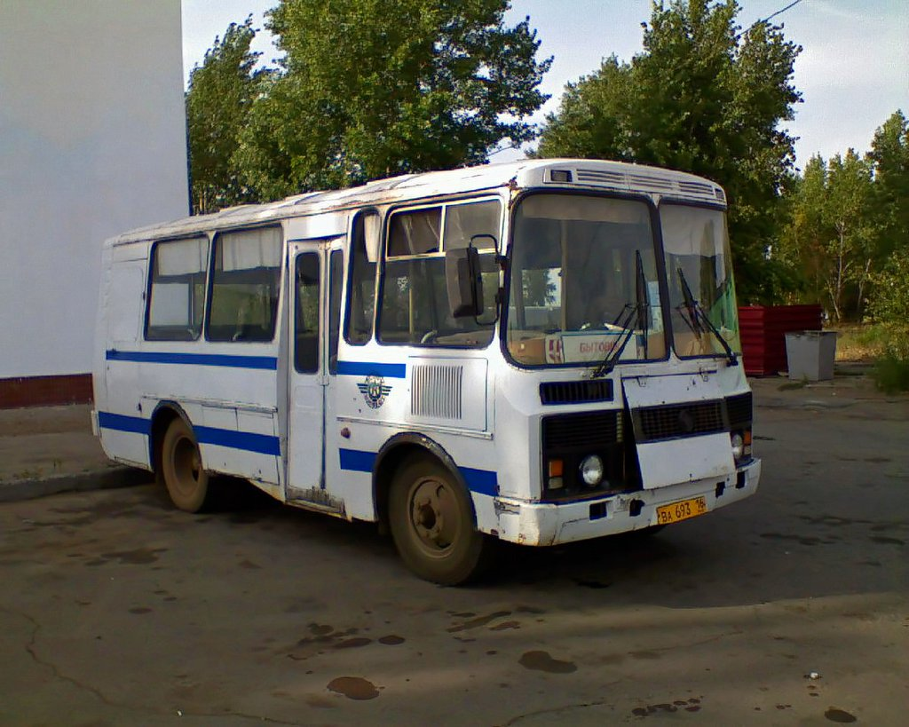 Автобус "ПАЗ-3205" в Набережных Челнах